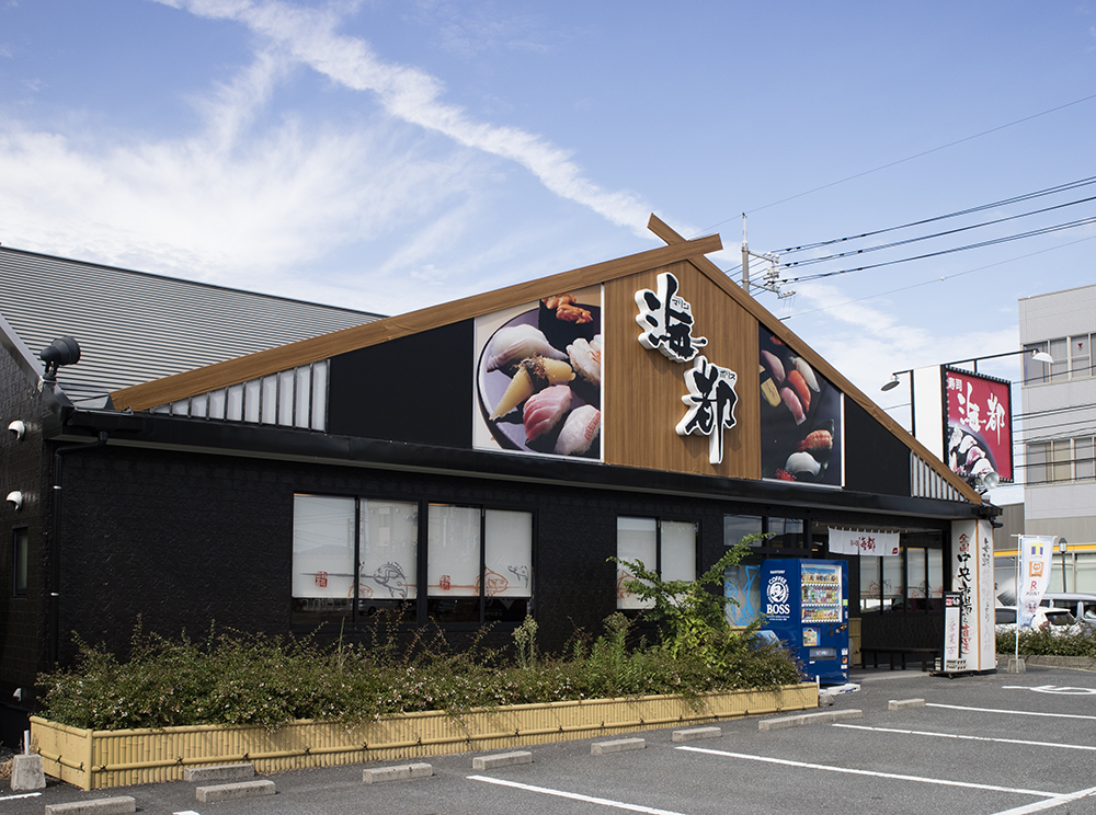 海都本店外観